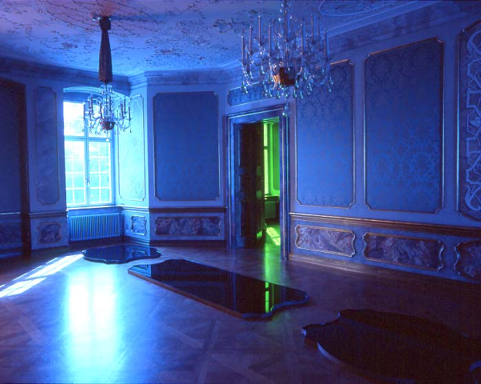 Rauminstallation III von Bruno Kurz